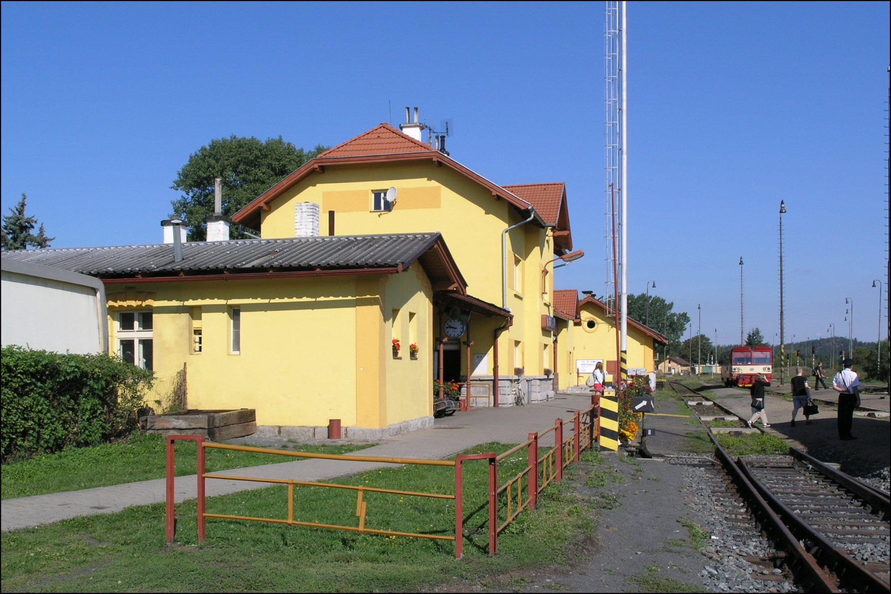 Blatno (okres Louny), železniční stanice Blatno u Jesenice